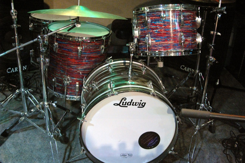 Ludwig drum-kit @ Savage Audio